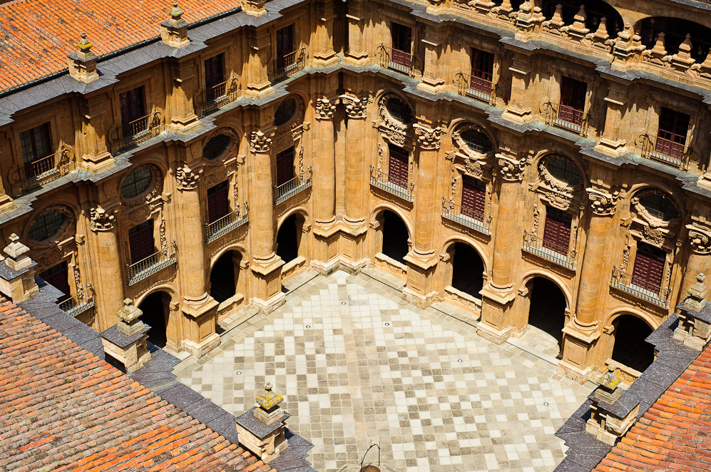 Patio de los estudios de la Clerecía de Salamanca (Universidad Pontificia)